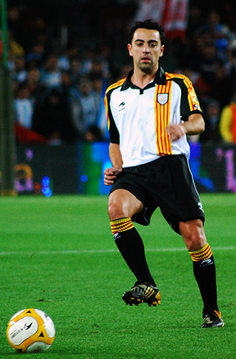 Xavi, amb la selecció de Catalunya, en un partit contra Argentina.